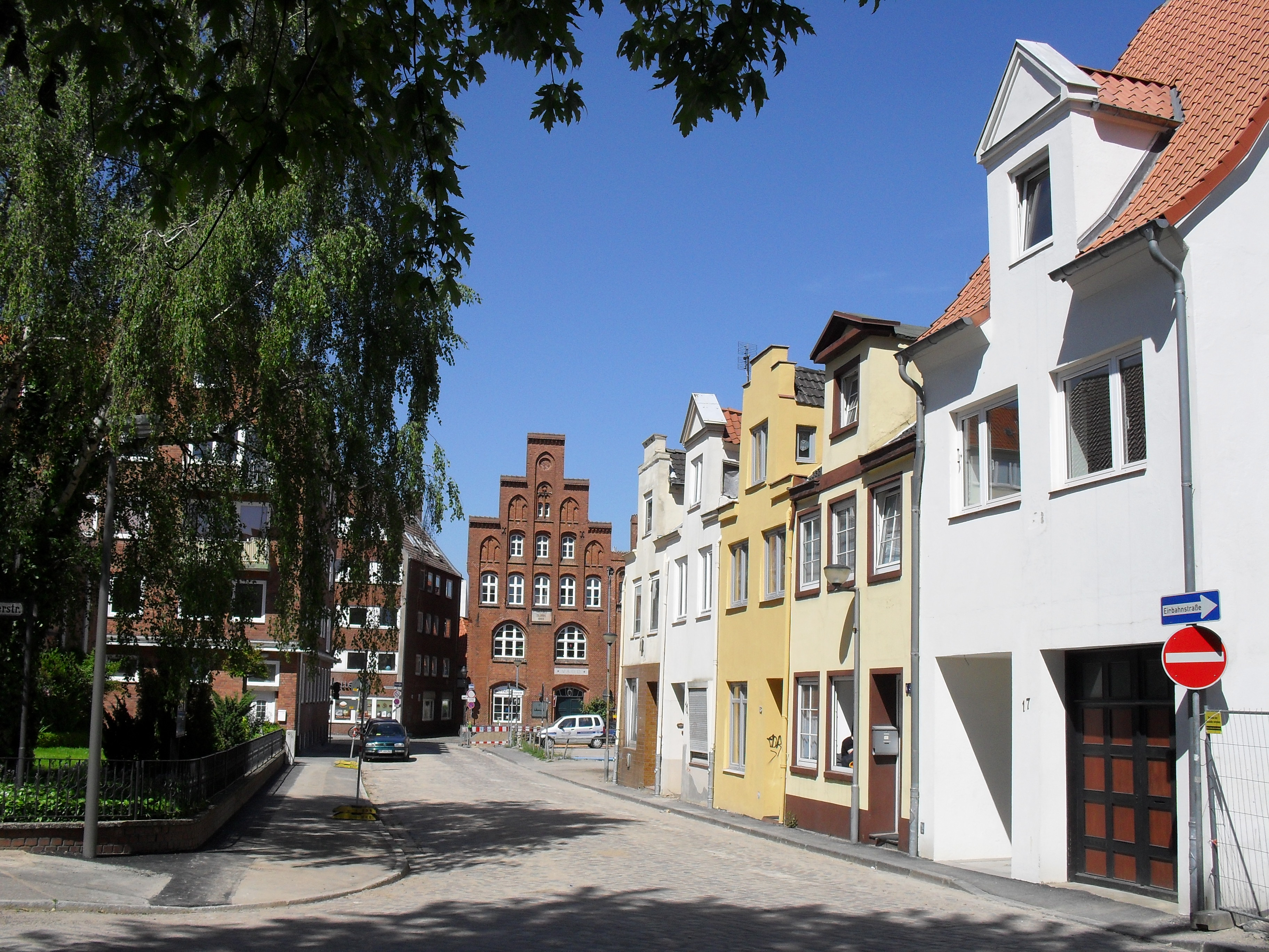 Der Ellerbrook in Lübeck